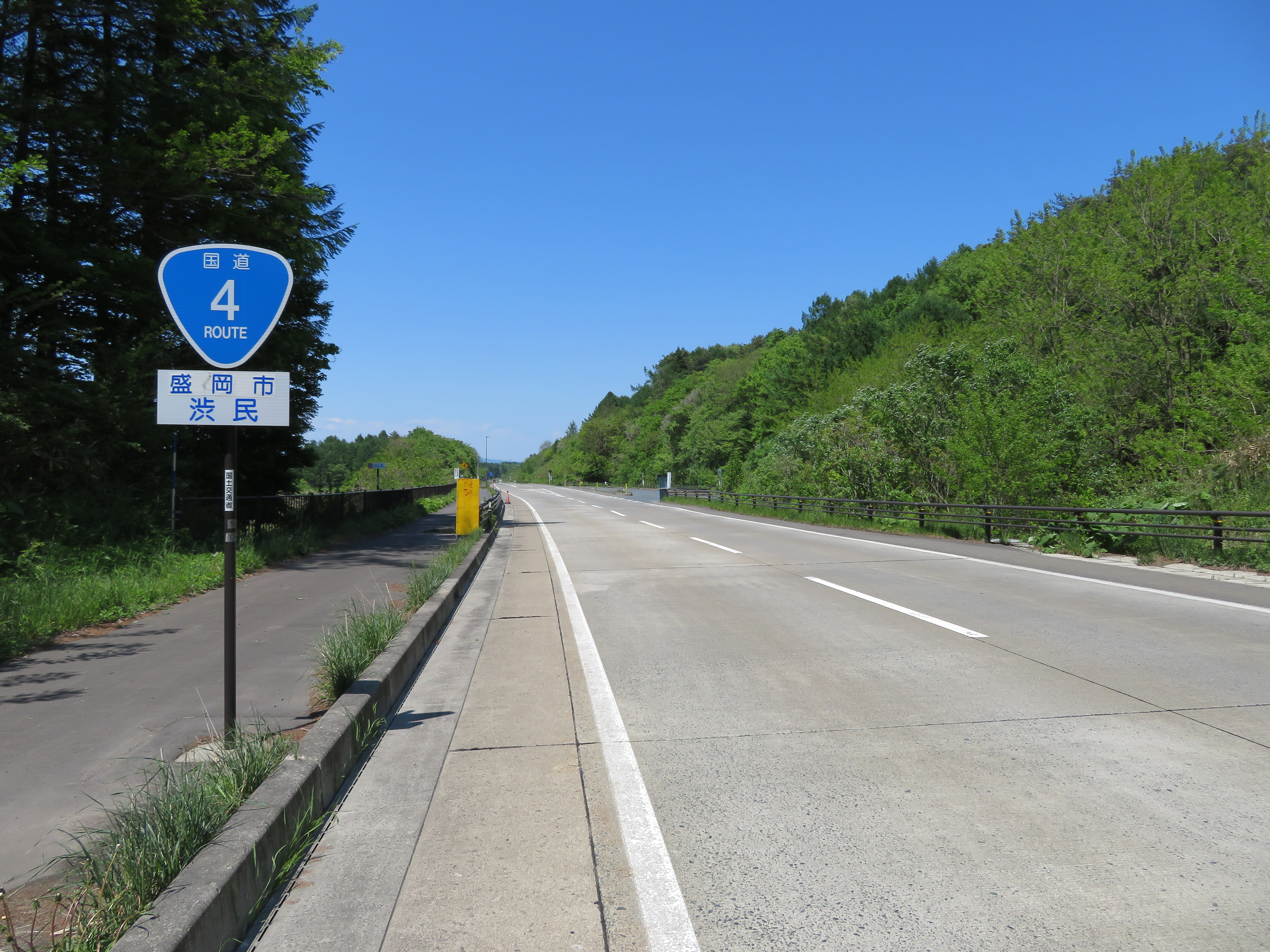 国道4号線 渋民バイパス 岩手県盛岡市渋民付近（二戸方面を撮影） Canon PowerShot SX720 HS